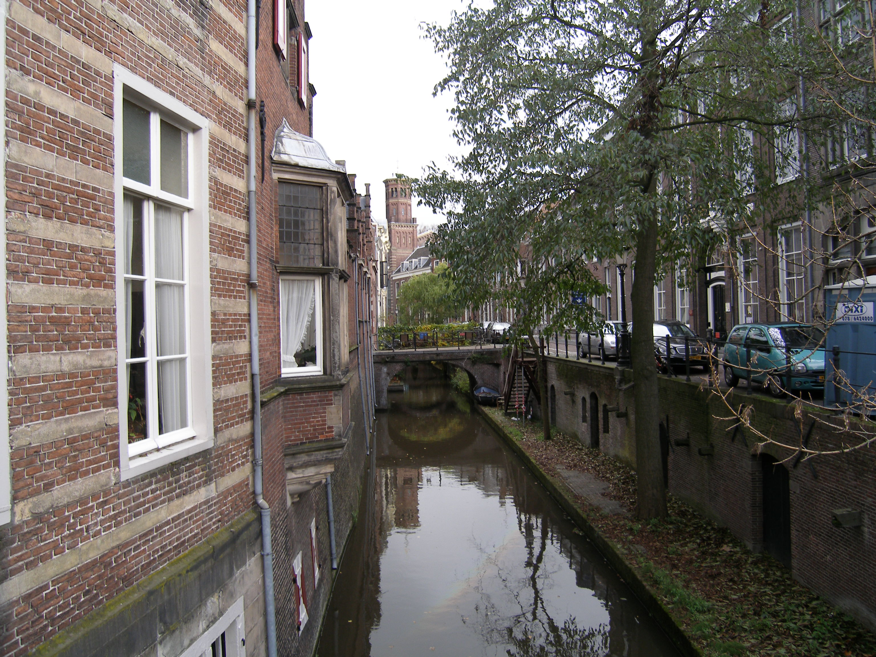 Kromme Nieuwegracht